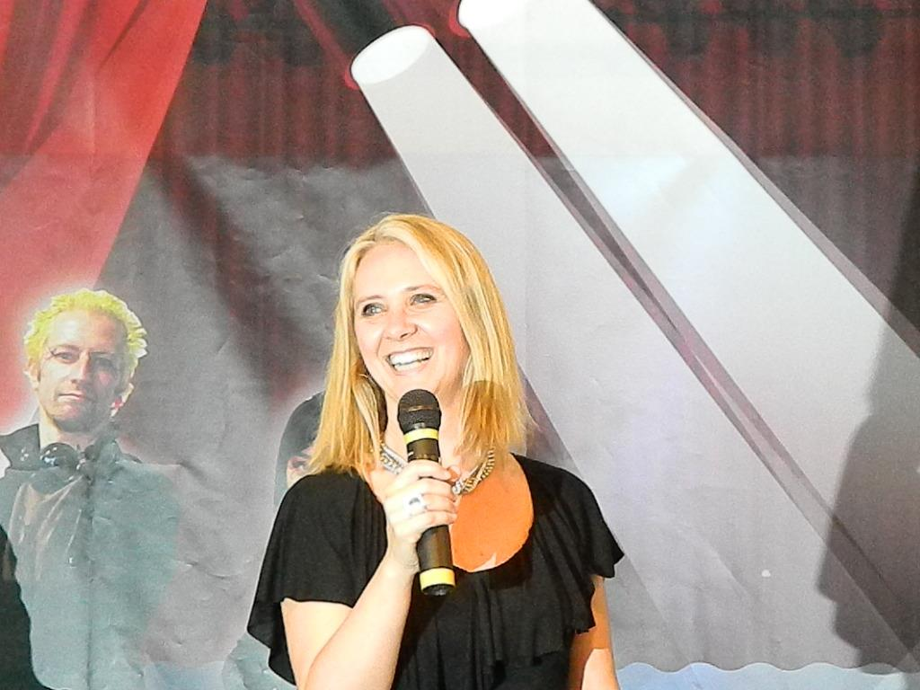 Foto scattata all'Anime Globe